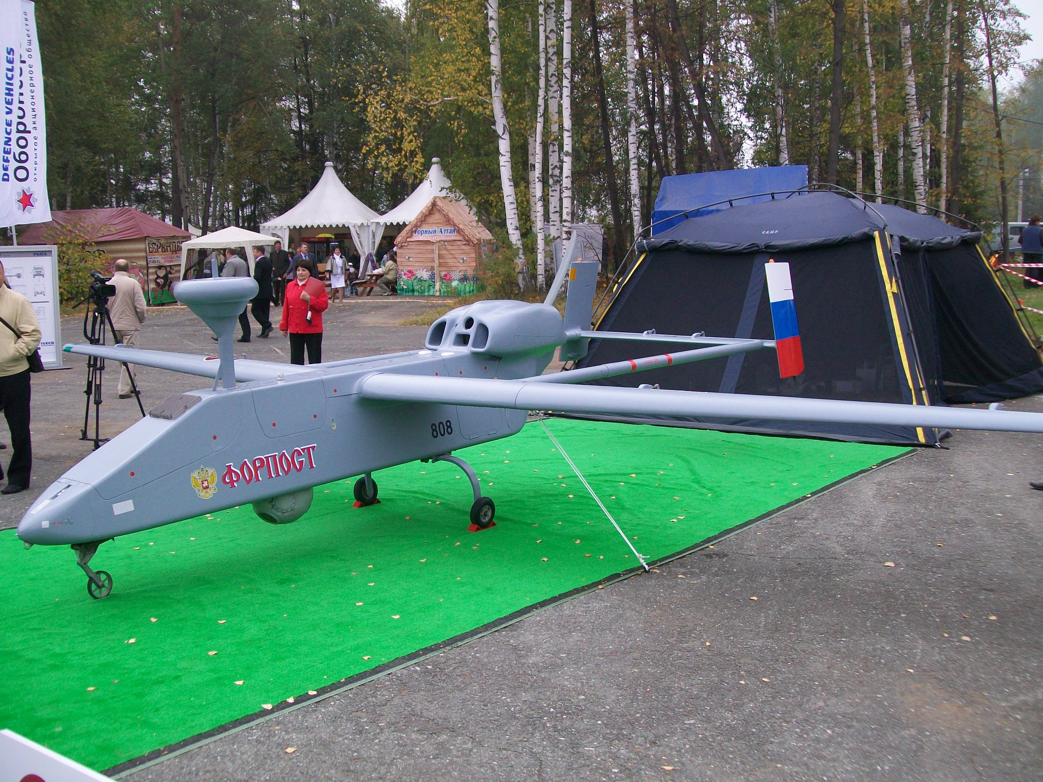 Беспилотный летательный аппарат Форпост на Международной выставке вооружения, военной техники и боеприпасов в Нижнем Тагиле (10 сентября 2011 года). IAI Searcher 2 c наклейкой "Форпост". Тот же бортовой номер 808 - PICTURE: First glimpse of Russian Searcher II UAS